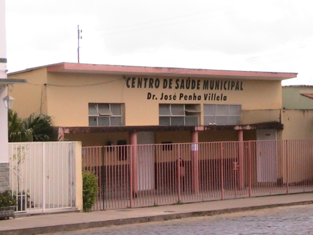 São Vicente de Minas (MG), Brazil Centro de Saúde Municipal Dr. José Penha Villela Municipal Health Centre Dr. José Penha Villela